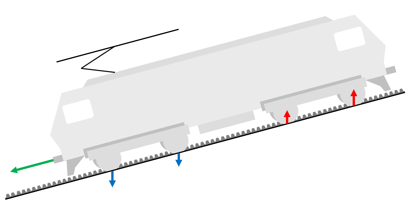 Entlastung (rot) der bergseitigen Achsen durch die vom Triebfahrzeug ausgeübte Zugkraft (grün) auf steilen Streckenabschnitten